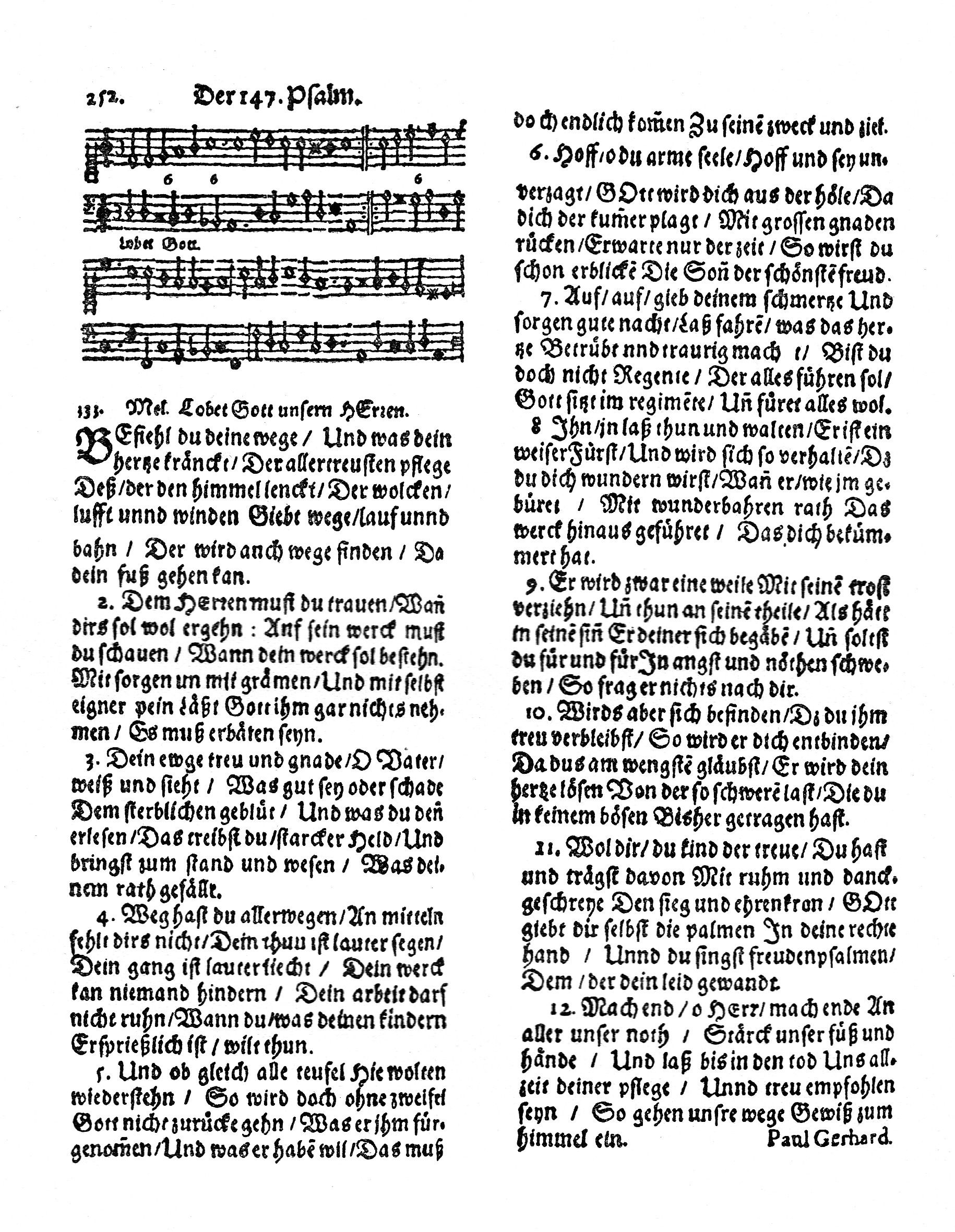 Paul Gerhardts Lied Befiehl du deine Wege, Druckfassung 1676